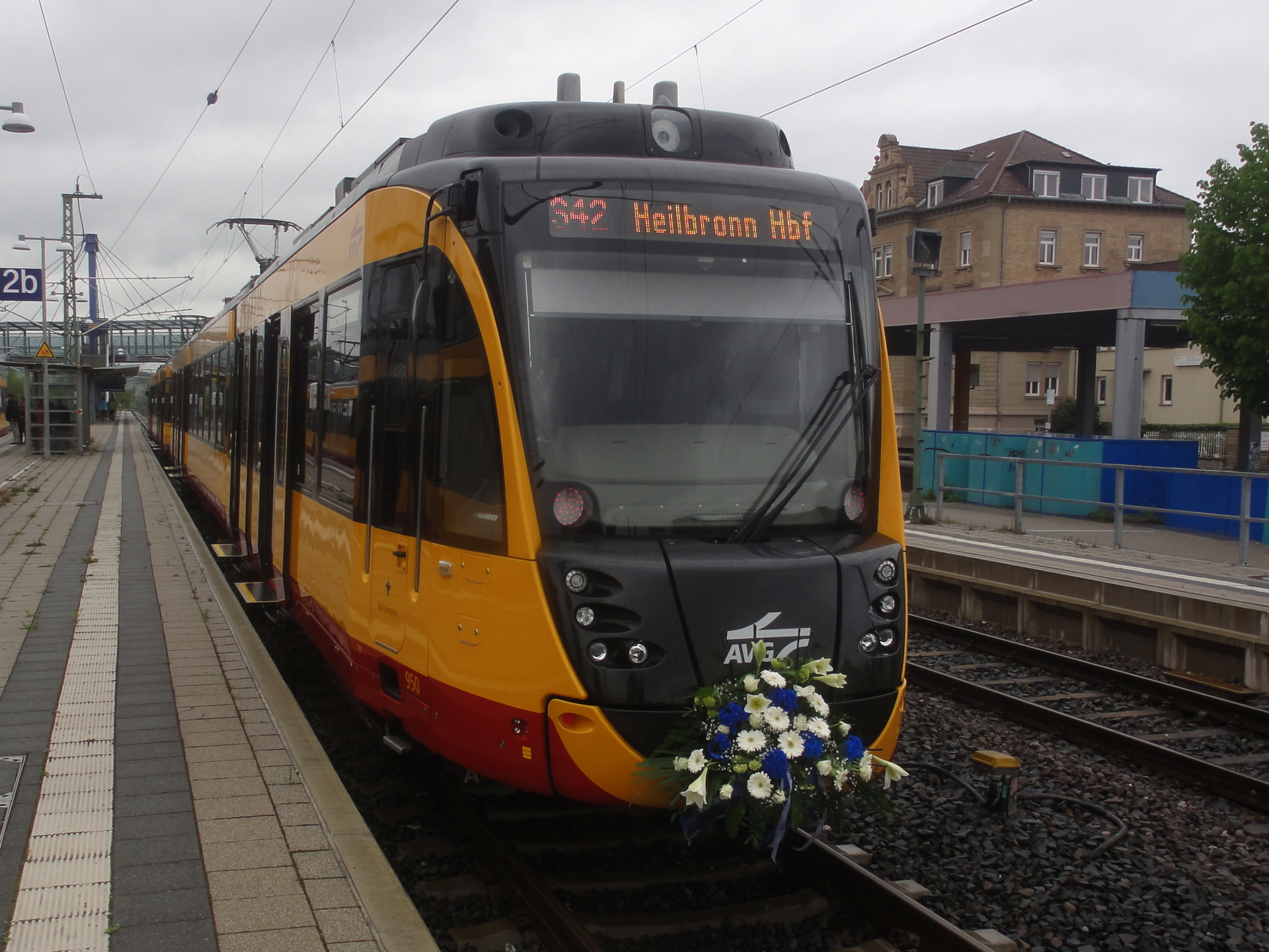 ET2010 950 der AVG als Eröffnungszug in Sinsheim.